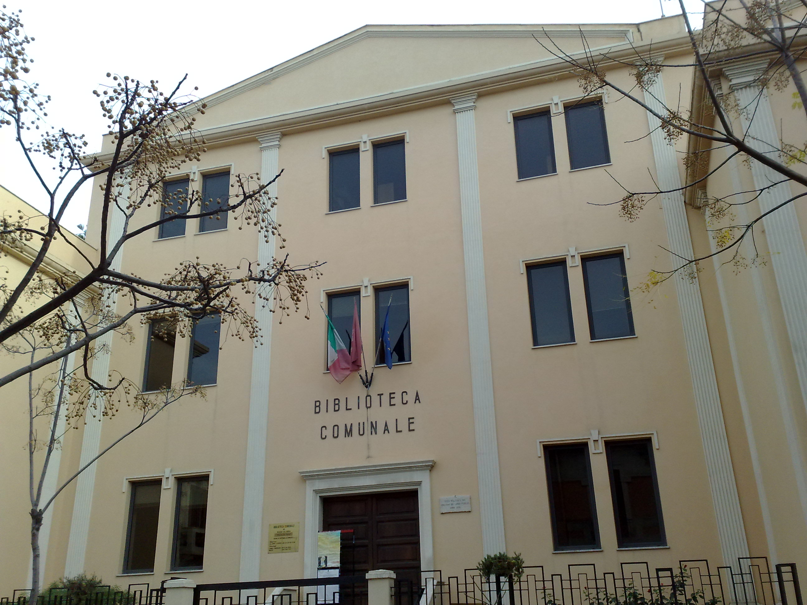 Biblioteca De Nava